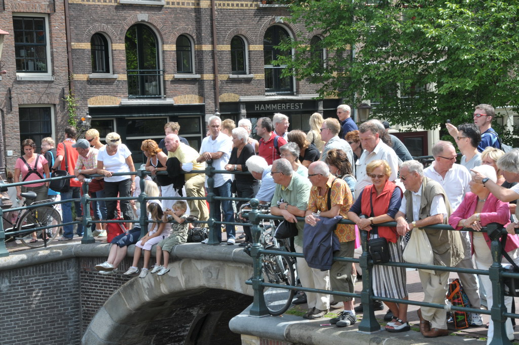 Зрители во время проведения гей-парада